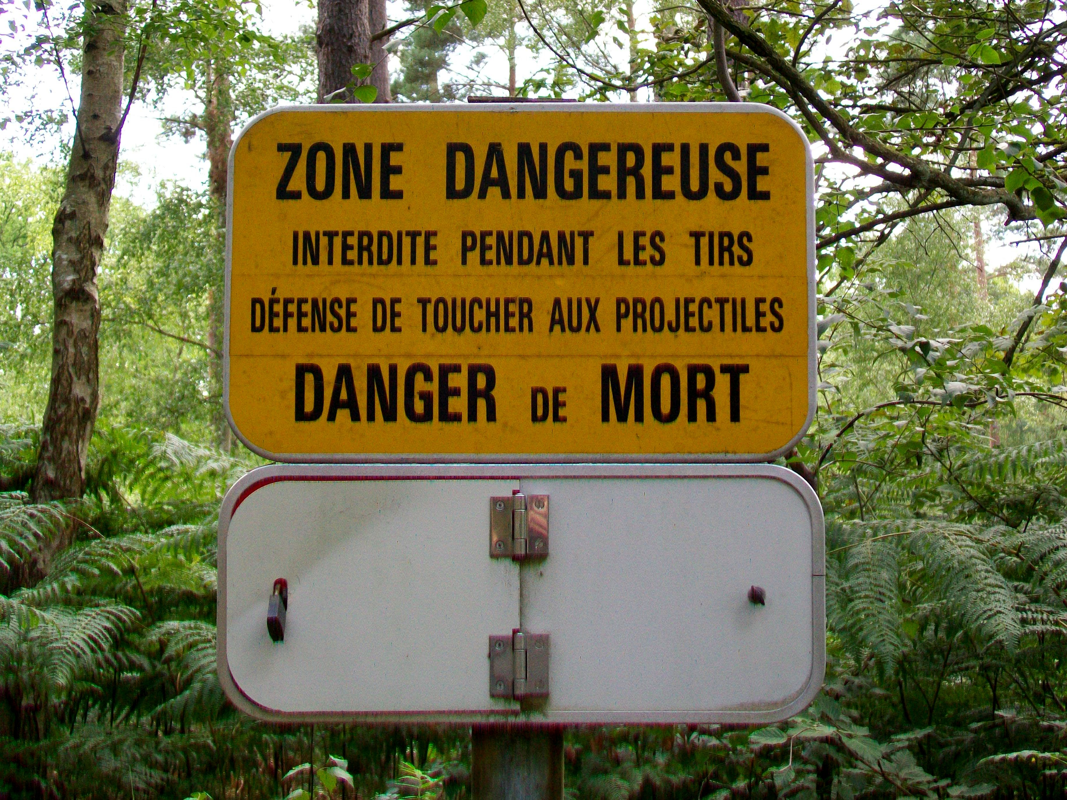 Le périmètre de sécurité du champ de tir de la forêt d'Ermenonville est signalé par des panneaux de ce type, accrochés à côté de chaque chemin qui entre dans le périmètre. Route du chêne de Mont-l'Evêque.